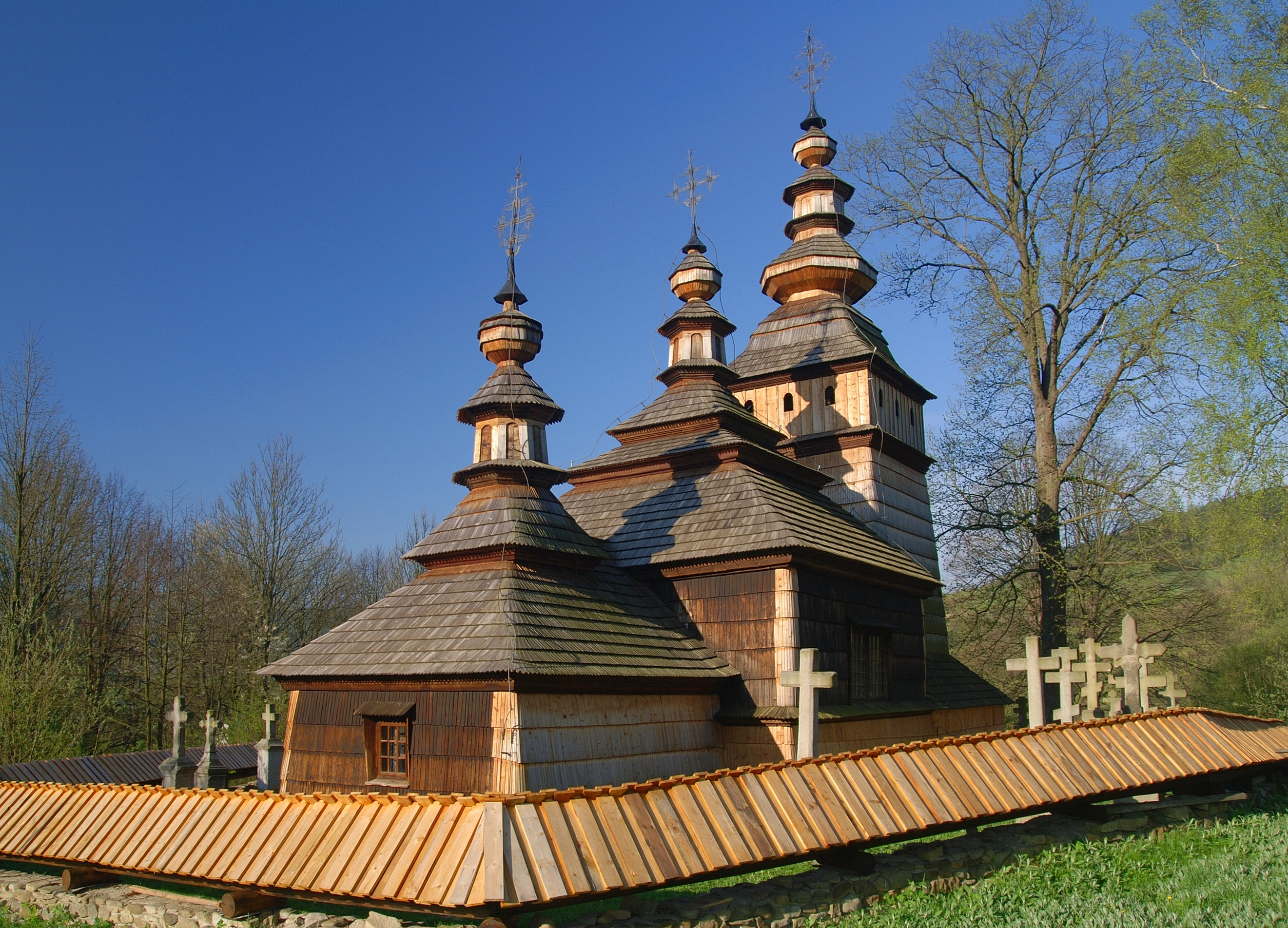 Cerkiew św. św. Kosmy i Damiana w Kotani